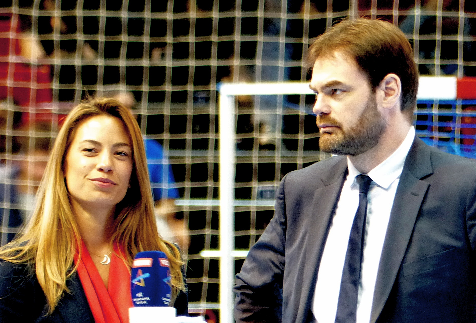 Bruno Martini, ancien gardien de but de handball et actuel manager du PSG Handball, au micro d'Anne-Laure Bonnet (beIN SPORTS) lors du match des quarts de finale de Ligue des Champions PSG/Veszprém. Le 19 avril 2014.